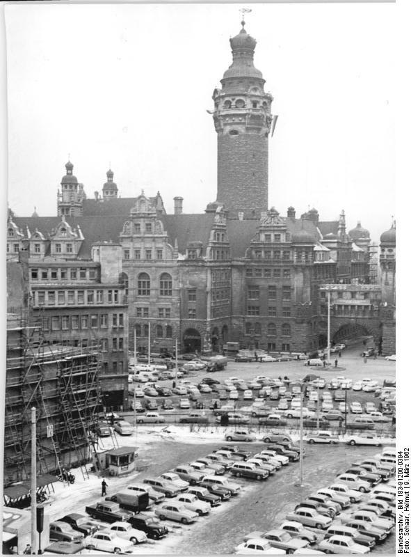 Leipzig, "Neues Rathaus", Parkplätze Zentralbild Schaar 9.3.1962 Leipziger Frühjahrsmesse 1962 International belebt sind die Parkplätze Leipzigs während der Messetage. Neues Rathaus.